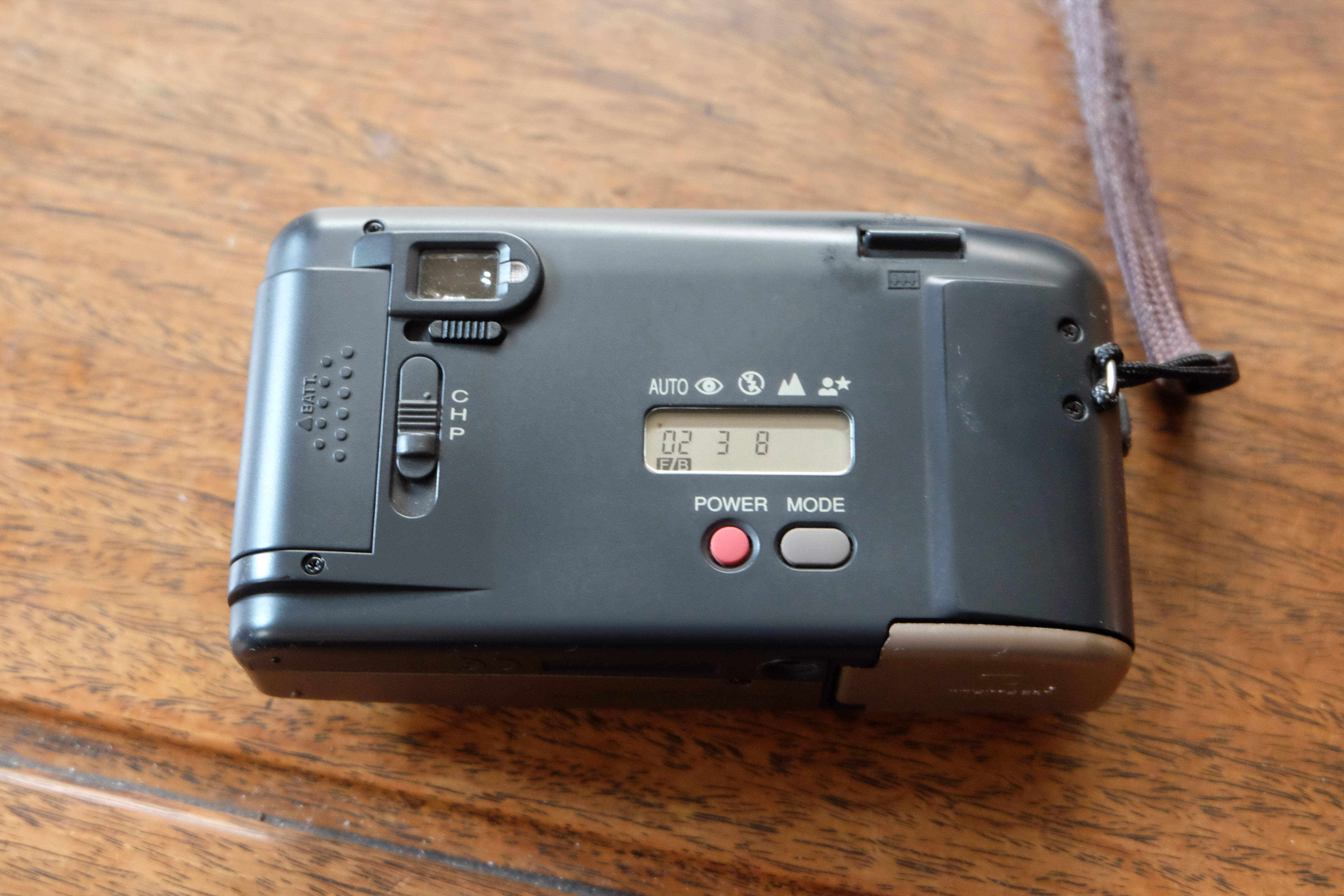 富士フイルム EPION 300Z APSフイルムカメラ